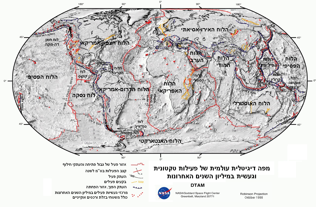 טקטוניקת הלוחות